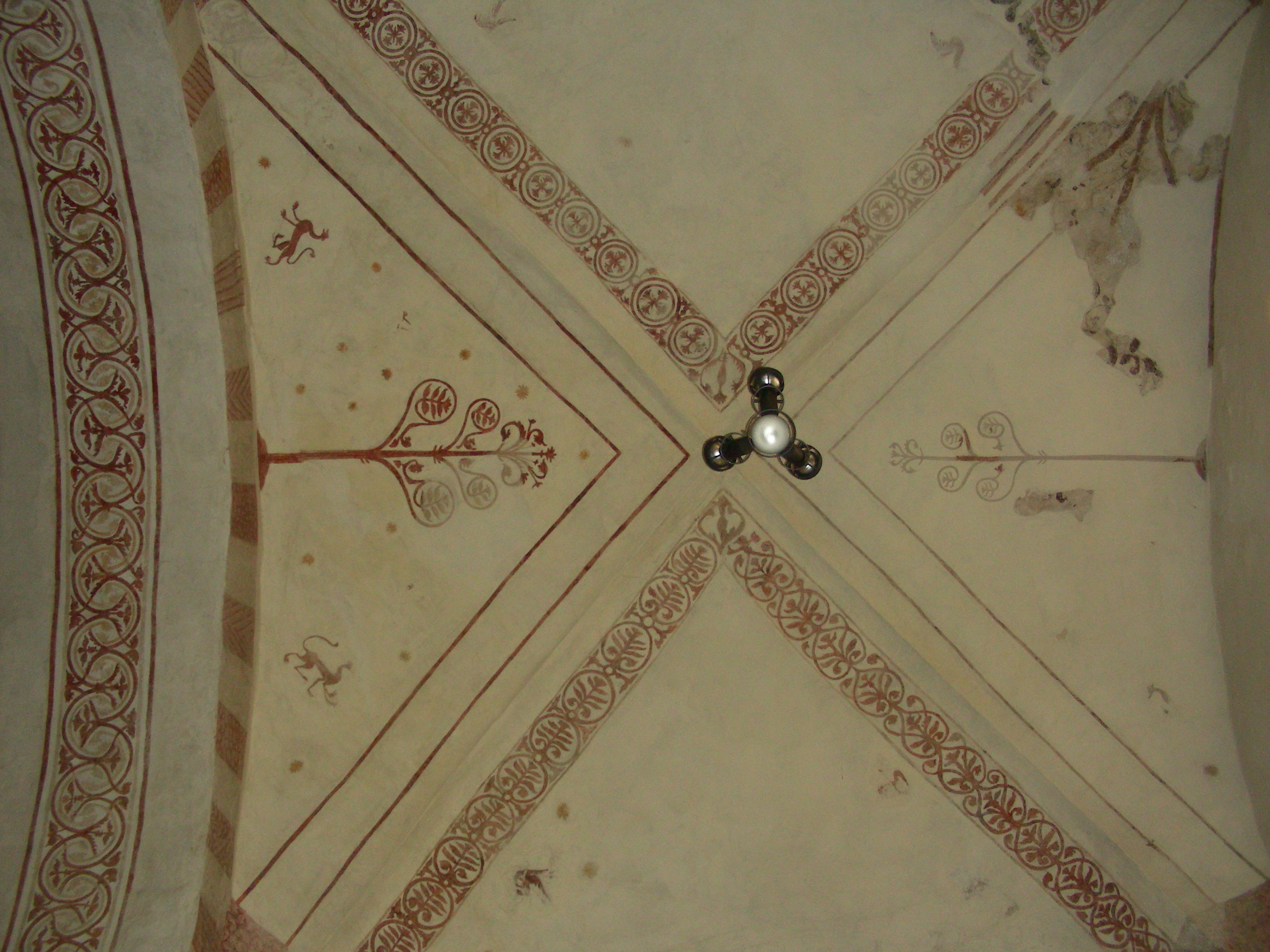 romanisches Gewölbe mit Malereibefunden